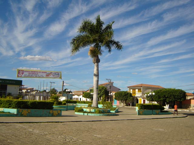 Praça do Fórum no centro da cidade de Santa Rita de Cássia - BA, que serve de ponto de encontro para a juventude local.